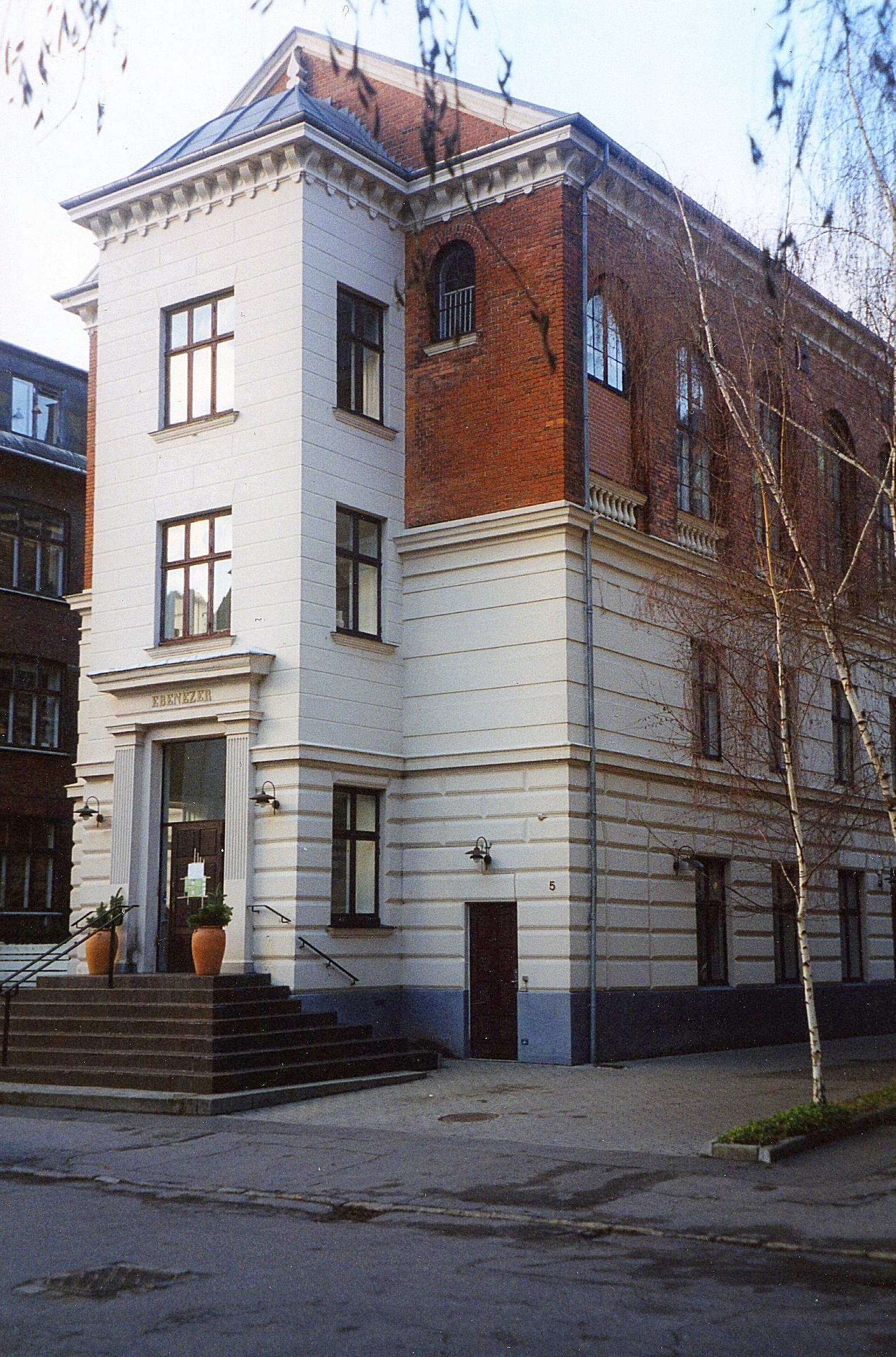 Ebenezer Adventkirke, Københavns Kommune